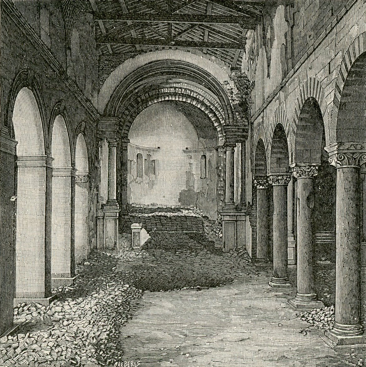 Volterra: rovine della navata della Badia (xilografia di Giuseppe Barberis).